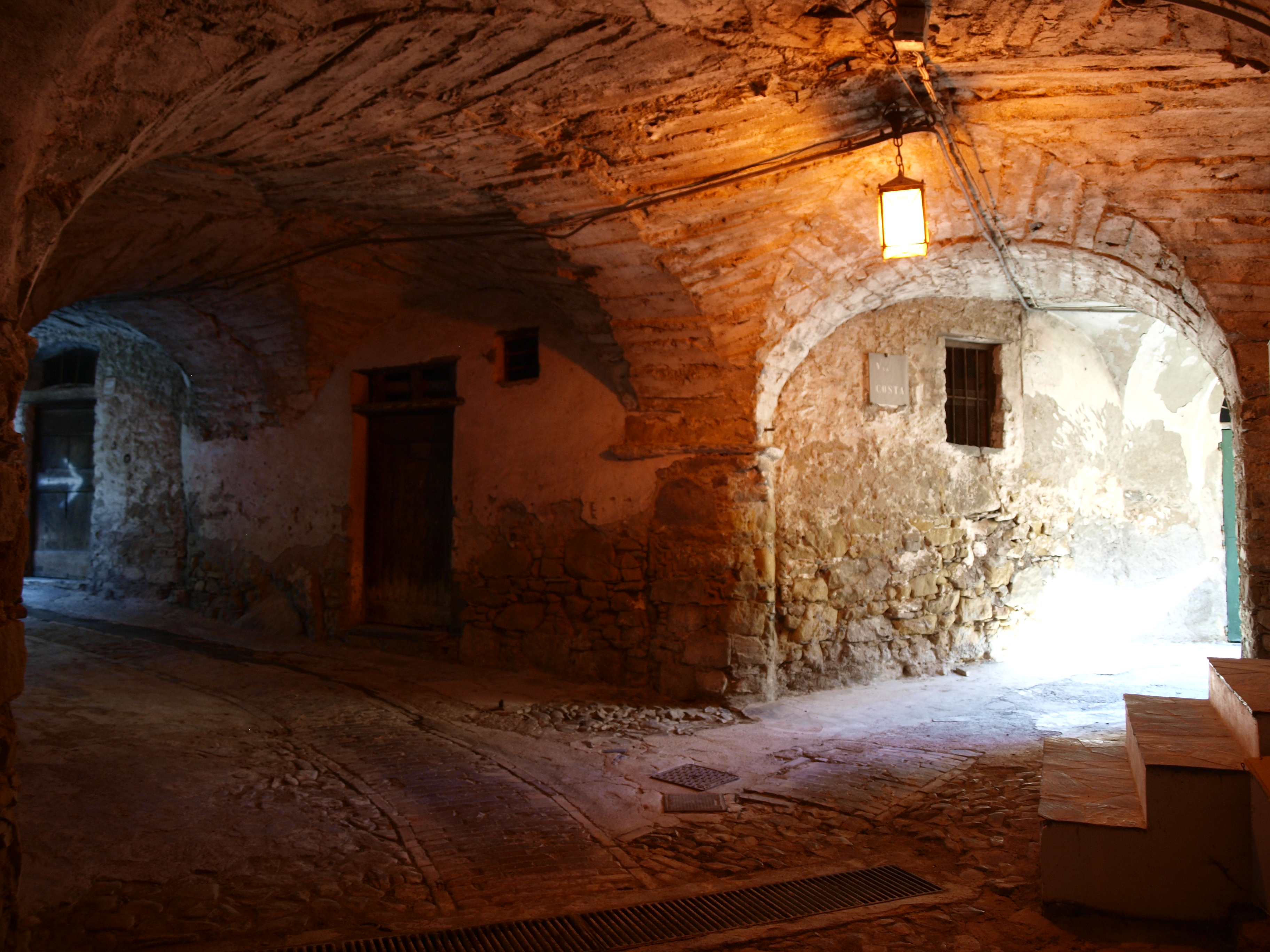 18010 Montalto Ligure IM, Italy